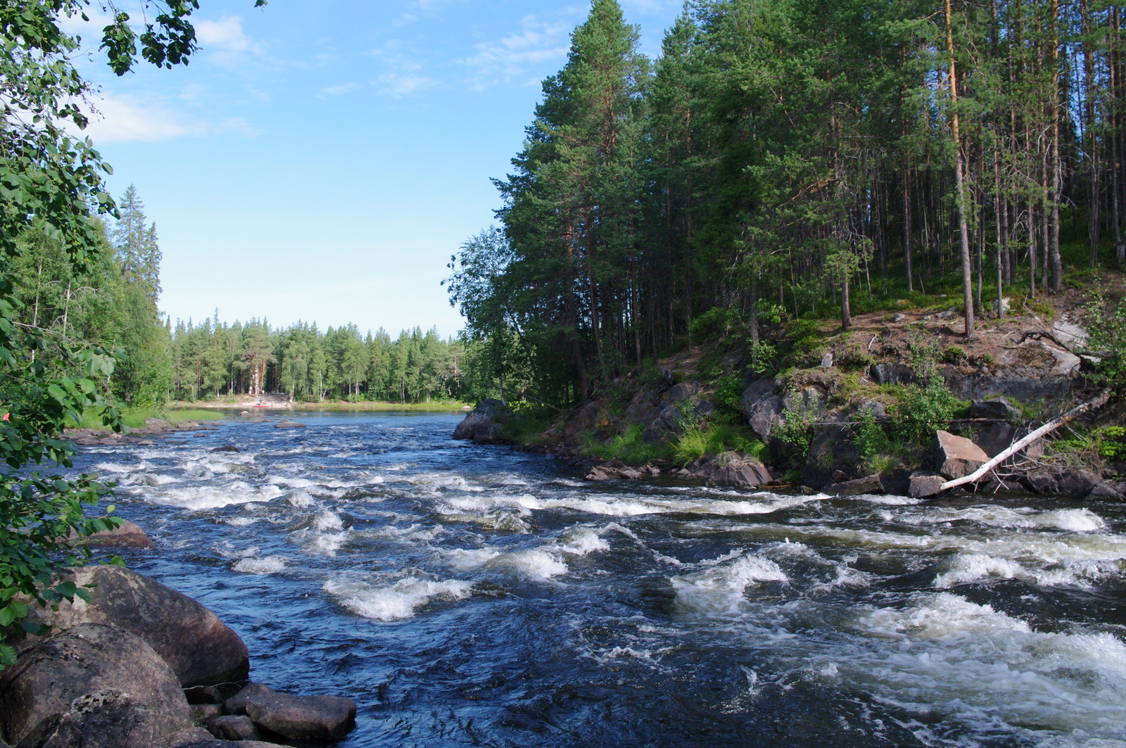 Керетский заказник, Лоухский район This image is related to the protected area of Russia number 1010068